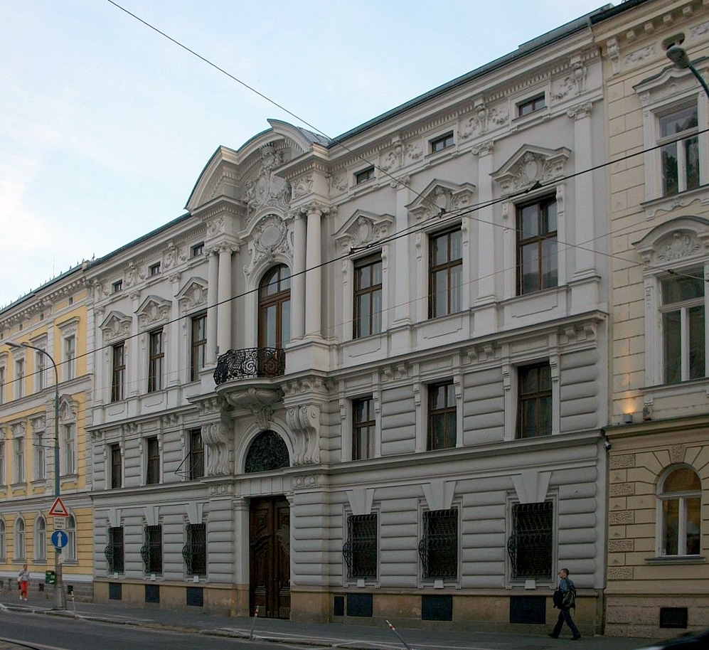 PALÁC MESTSKÝ